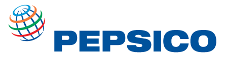 PepsiCo logo, логотип PepsiCo